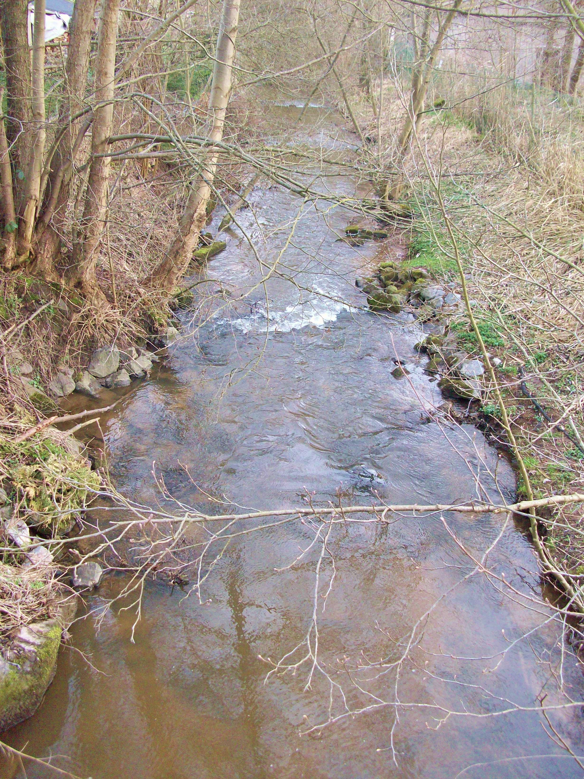 Der Ulfenbach direkt an der Brücke zum Burgstalls Waldau in Grasellenbach OT Wahlen